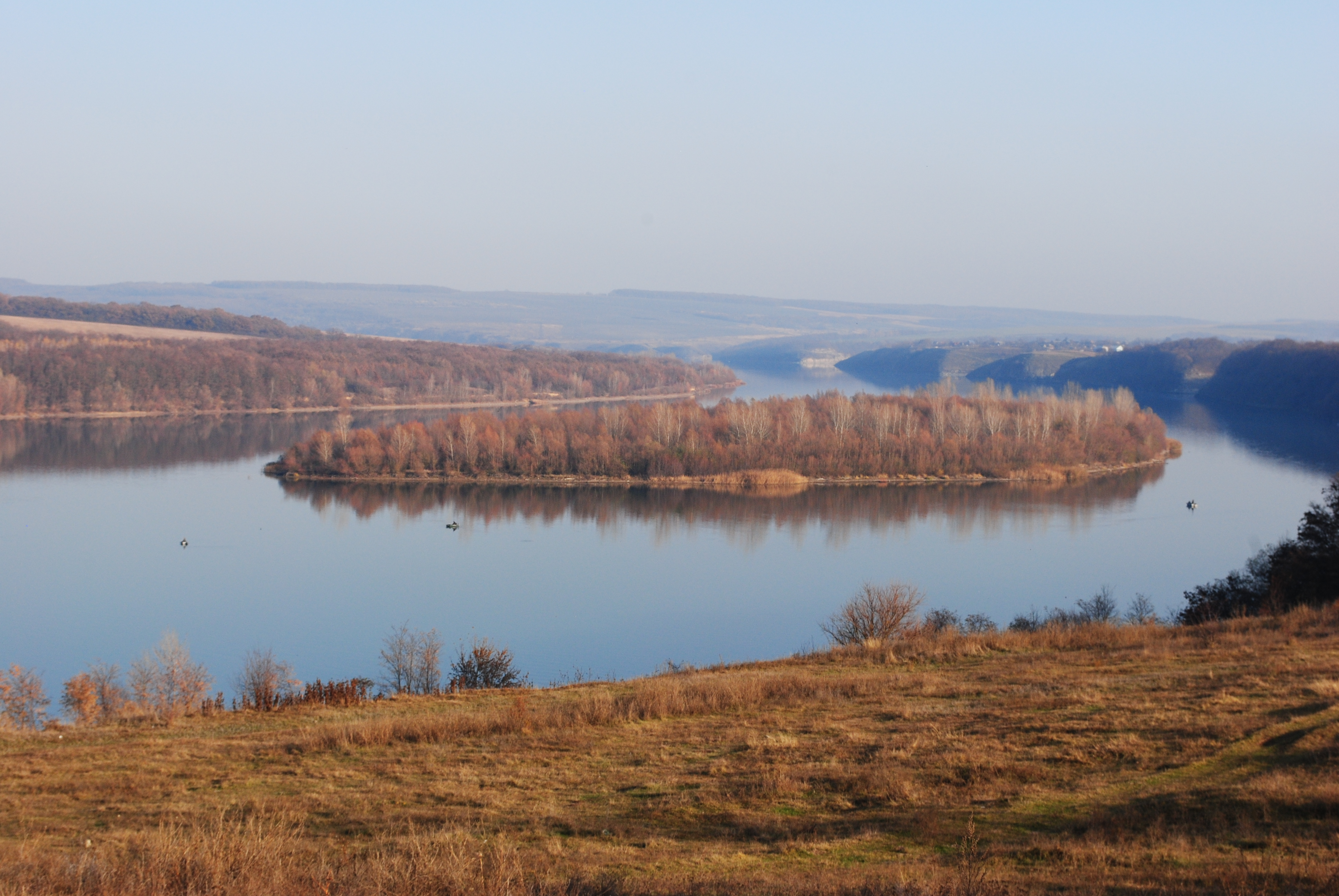 Зйомка із села Бернове